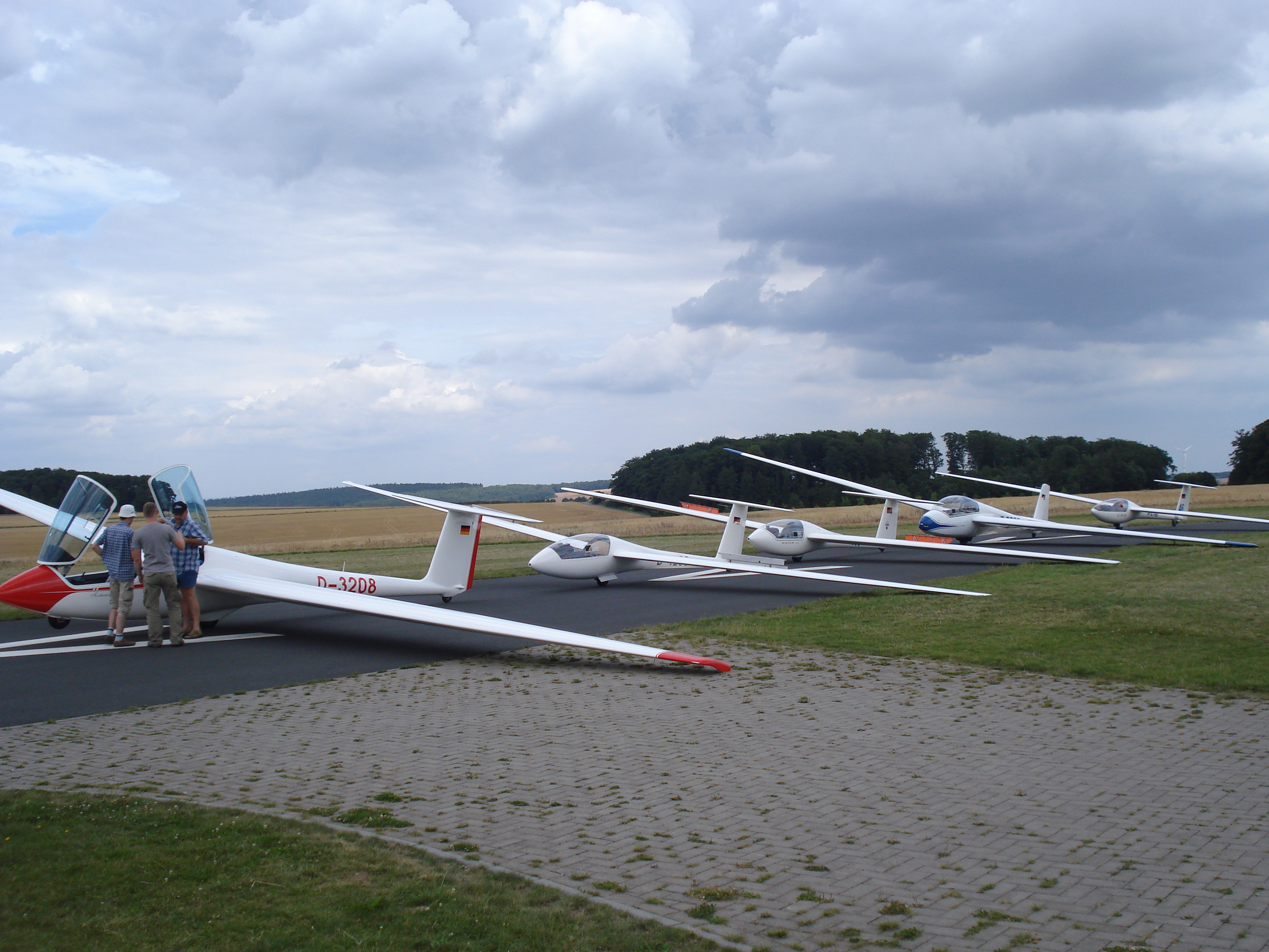 Flugzeuge von links nach rechts: ASK 21, LS 4, Astir CS, ASK 13, DG 300